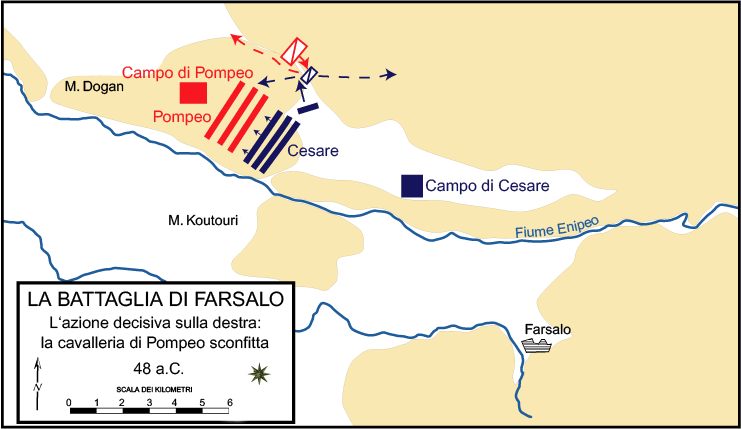 La Battaglia di Farsalo, traduzione di fonte